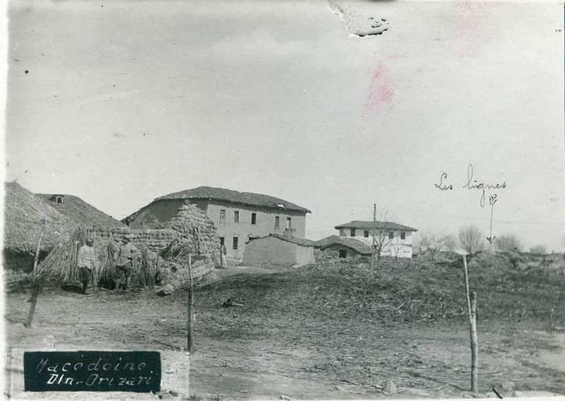 Долно Оризари през Първата световна война